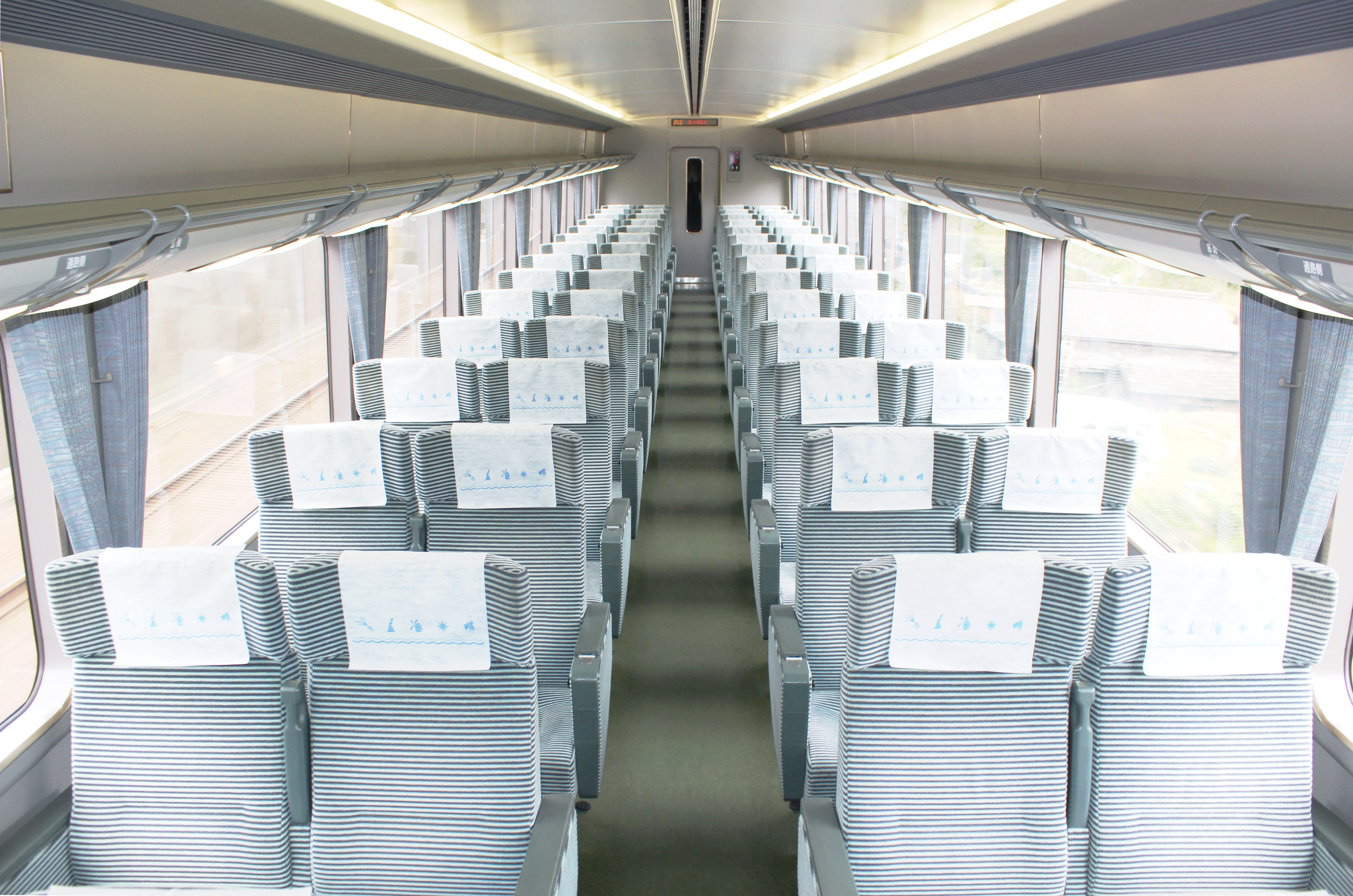 近鉄22000系客室